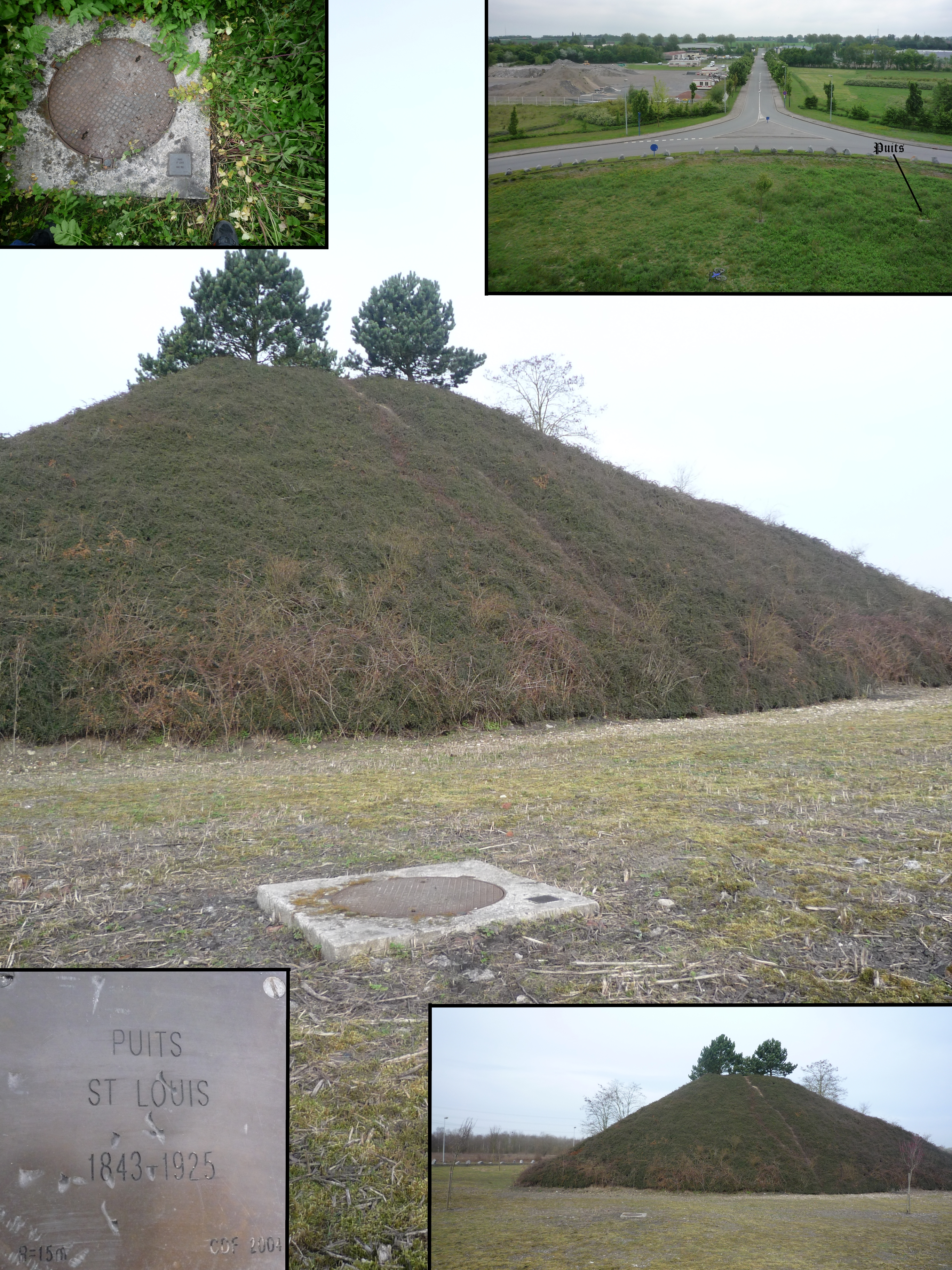 La Fosse Saint Louis de la Compagnie des mines d'Aniche était un charbonnage constitué d'un seul puits situé à Somain, Nord, Nord-Pas-de-Calais, France.